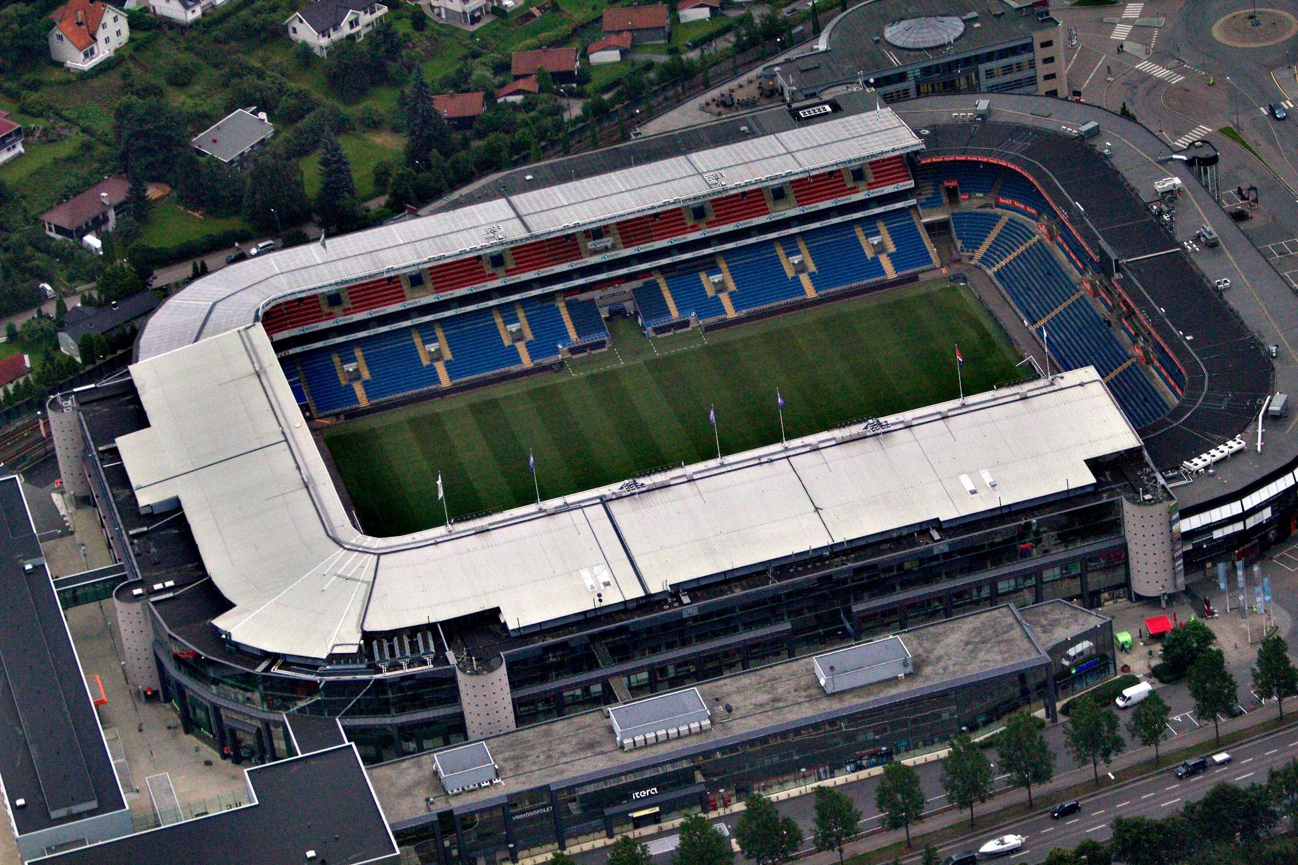 Ullevål stadion